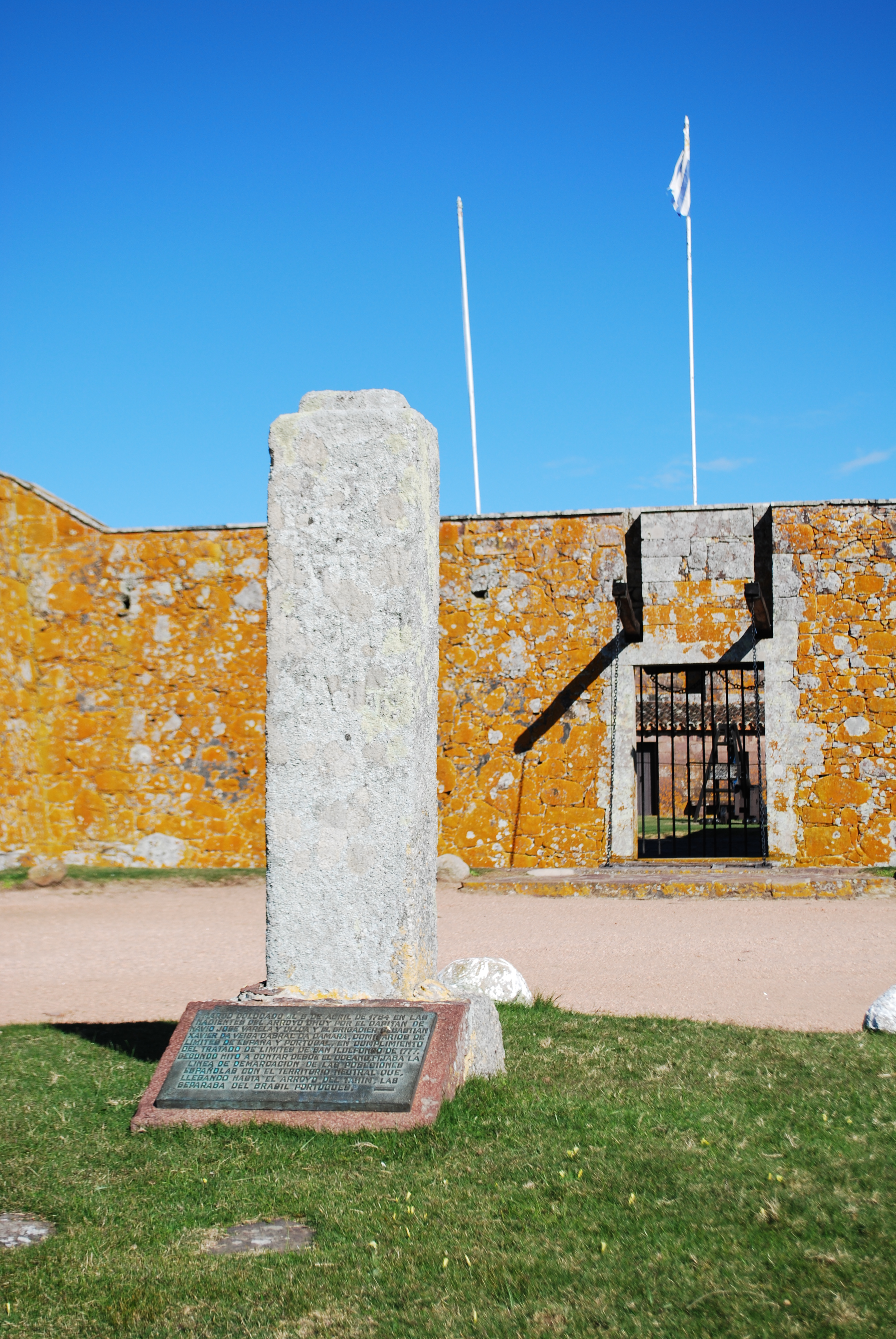 Puerta y placa historica del Fuerte San Miguel ubicado en el Departamento de Rocha,Uruguay.